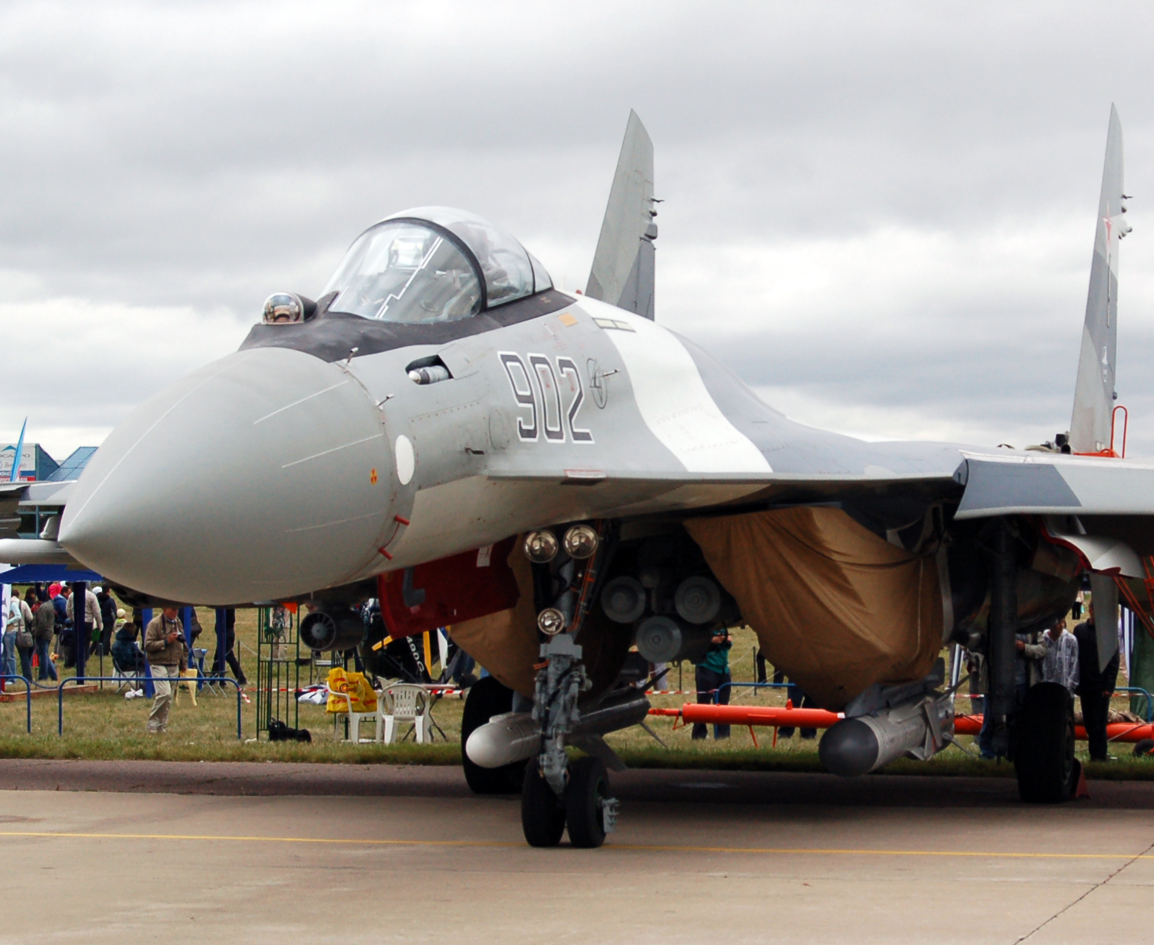 Самолёт Су-35С (б/н 902) на МАКС-2009